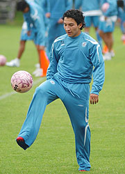 Jugador de futbol mexicano César Osvaldo Villaluz Martinez, Club Cruz Azul